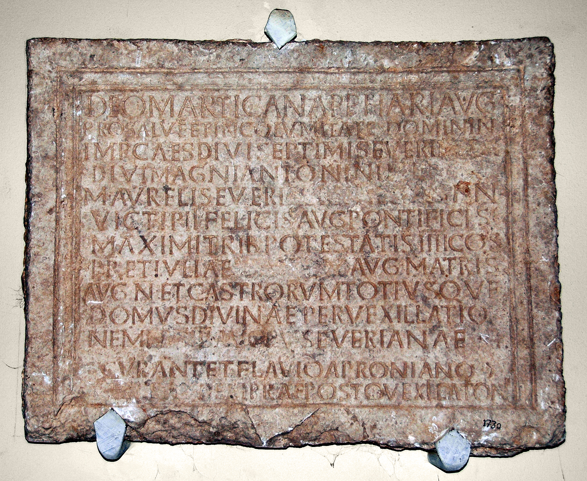 Das Kastell Gholaia, das durch antike Quellen auch als castra Chol(aia), [G]olas sowie in der Tabula Peutingeriana als Chosol überliefert ist, war ein römisches Militärlager, das für Sicherungs- und Überwachungsaufgaben am vorderen Limes Tripolitanus, einem tiefgestaffelten System von Kastellen und Militärposten, in der römischen Provinz Africa proconsularis zuständig war. Dedikation an Mars Canapphar Augustus, AE 1979, 645, im Leptis Magna Museum, Libyen. Der Name des Kaisers Marcus Aurelius Severus Alexander (222–235) wurde nach dessen Ermordung auf der Weiheinschrift des Tempels eradiert. Aufgrund ihrer Treue zu Kaiser Maximinus Thrax und dessen ihm loyal gebliebenen numidischen Statthalter Capelianus bei der Unterdrückung des Usurpators Gordian I. (238) ließ der nachfolgende Kaiser Gordian III. (238–244) die Legio III Augusta auflösen und den Namen der Legion ebenfalls eradieren. Das Fundstück wurde 2008 im Archäologischen Museum von Leptis Magna photographiert. Deo Marti Canapphari Aug(usto) pro salute et incolumitate domini n(ostri) Imp(eratoris) Caes(aris) divi Septimi Severi [nepotis] divi Magni Antonini [filii] M(arci) Aureli Severi [Alexandri] In- victi Pii Felicis Aug(usti) pontificis maximi trib(uniciae) potestatis IIII co(n)s(ulis) p(atris) p(atriae) et Iuliae [Mamm(a)eae] Aug(ustae) matris Aug(usti) n(ostri) et castrorum totiusque domus divinae per vexillatio/nem [leg(ionis) III Aug(ustae) P(iae) V(indicis)] Severianae curante T(ito) Flavio Aproniano (centurione)